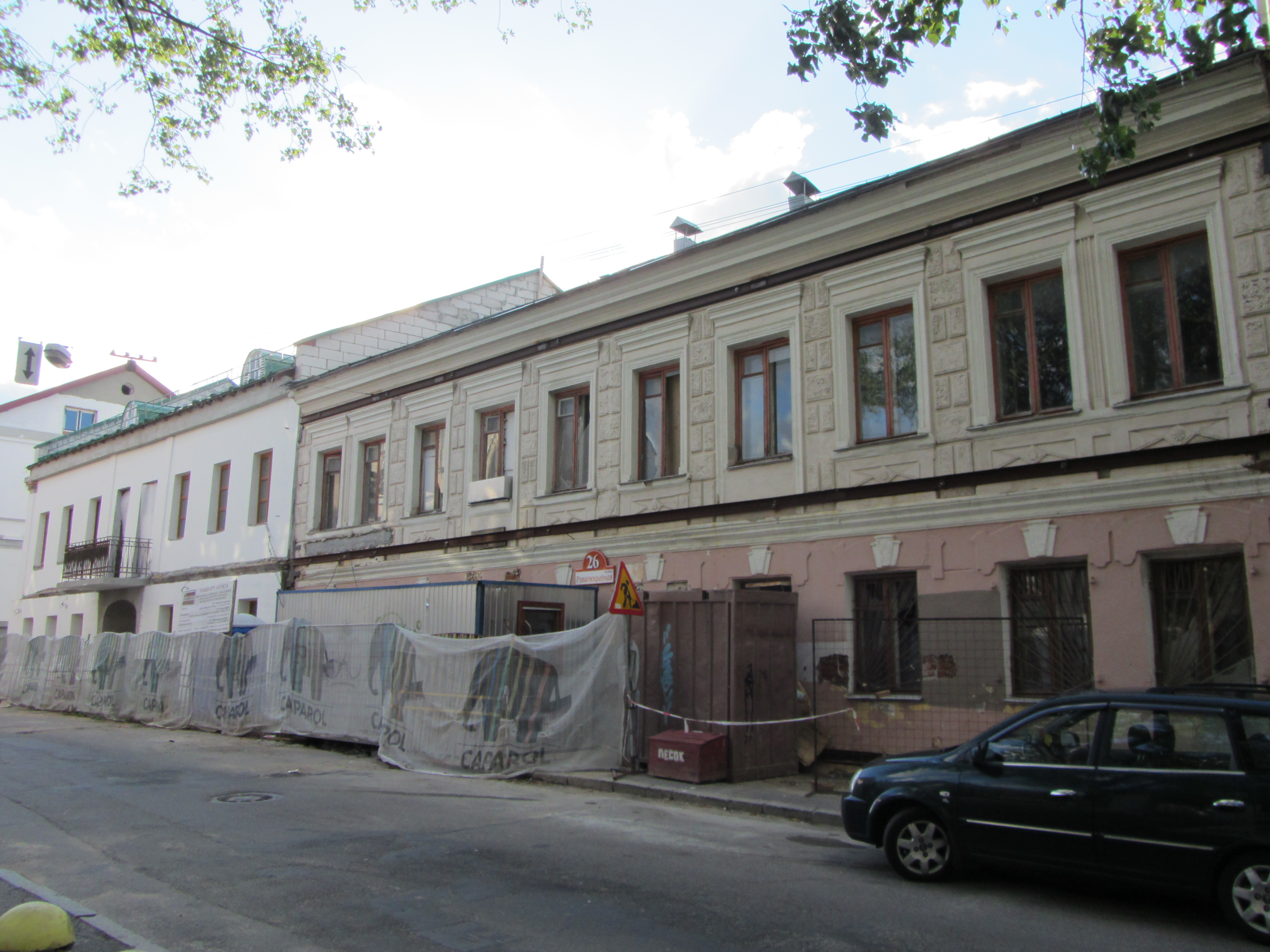 Беларуская (тарашкевіца): Вуліца Рэвалюцыйная, 26, 28